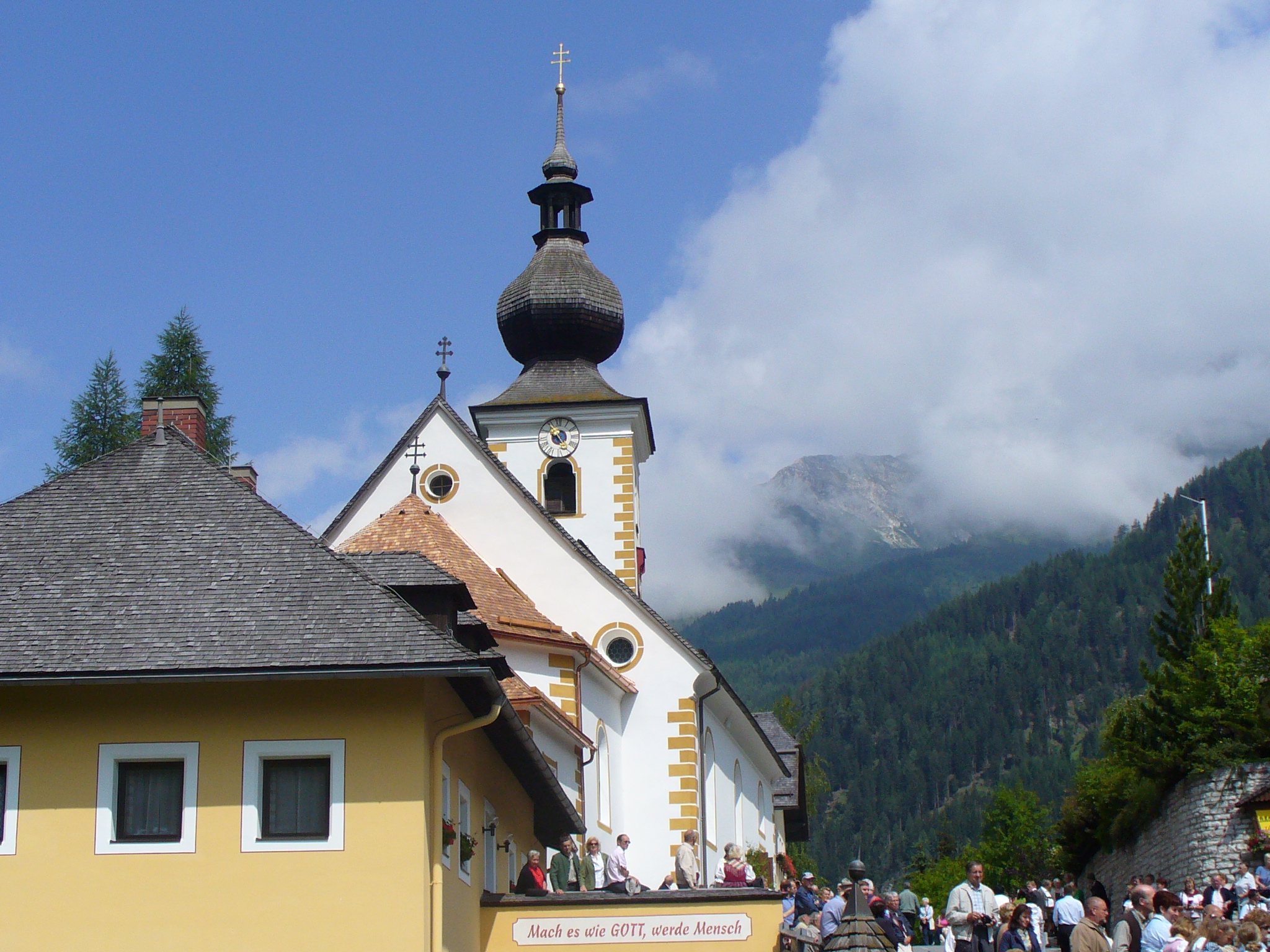 Zederhauser Pfarrkirche